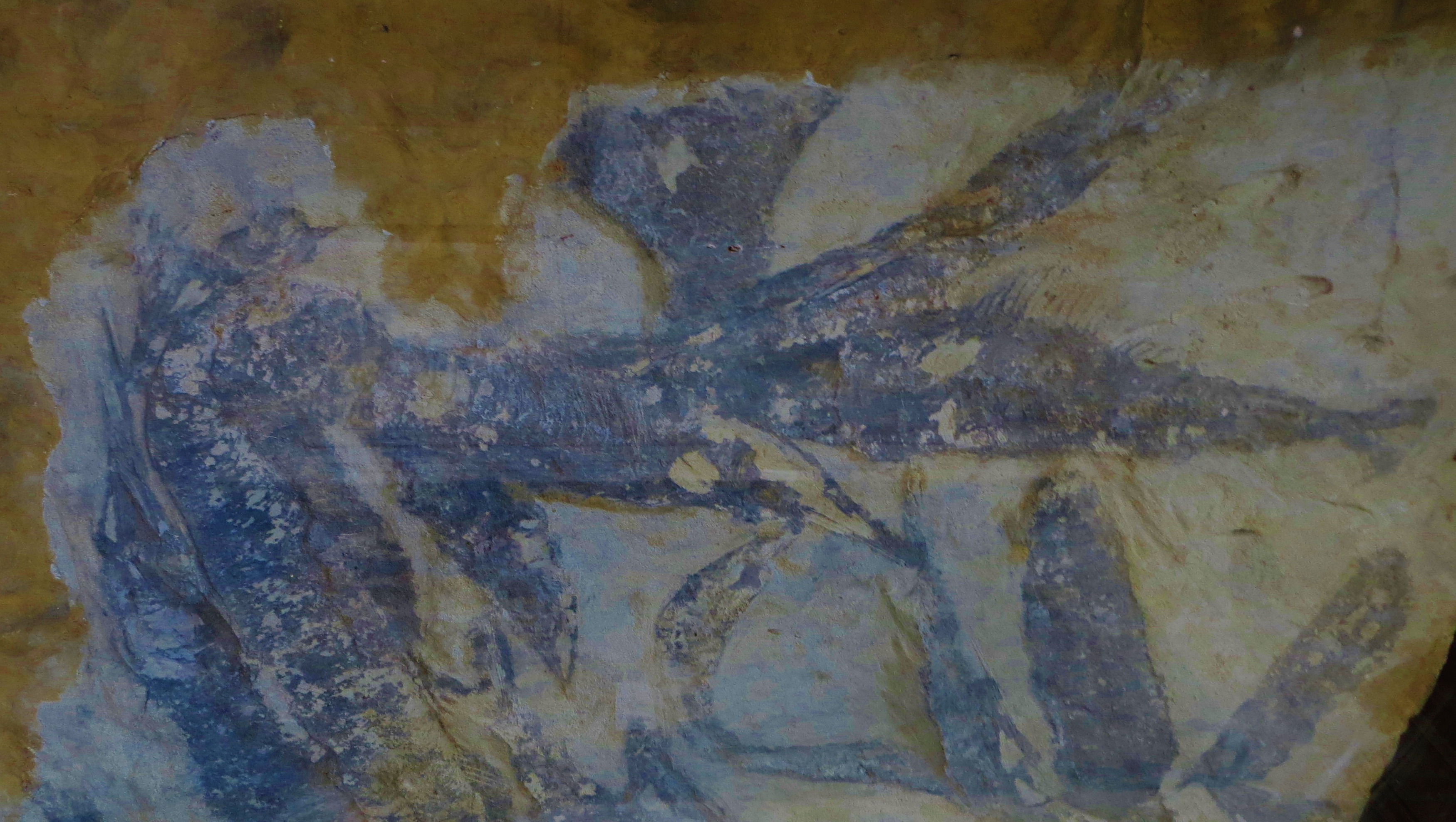 Fossil of Palaeorhynchus, an extinct fish- Took the photo at Musee d'Histoire Naturelle, Paris